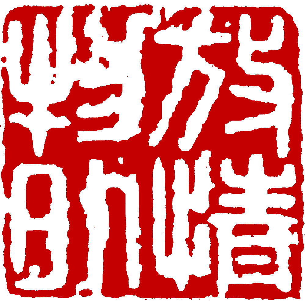 中文（中国大陆）: 東皋心越刻放情物外印